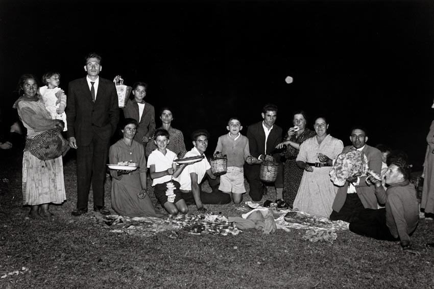 Ambiente en un Chiringuito en Galicia a comienzos del Siglo XX, Xiringuito Estrella